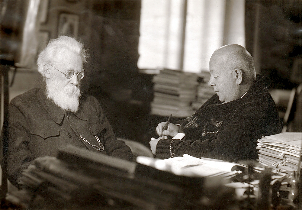 В. И. Вернадский и А. Е. Ферсман, квартира В. И. Вернадского в Москве